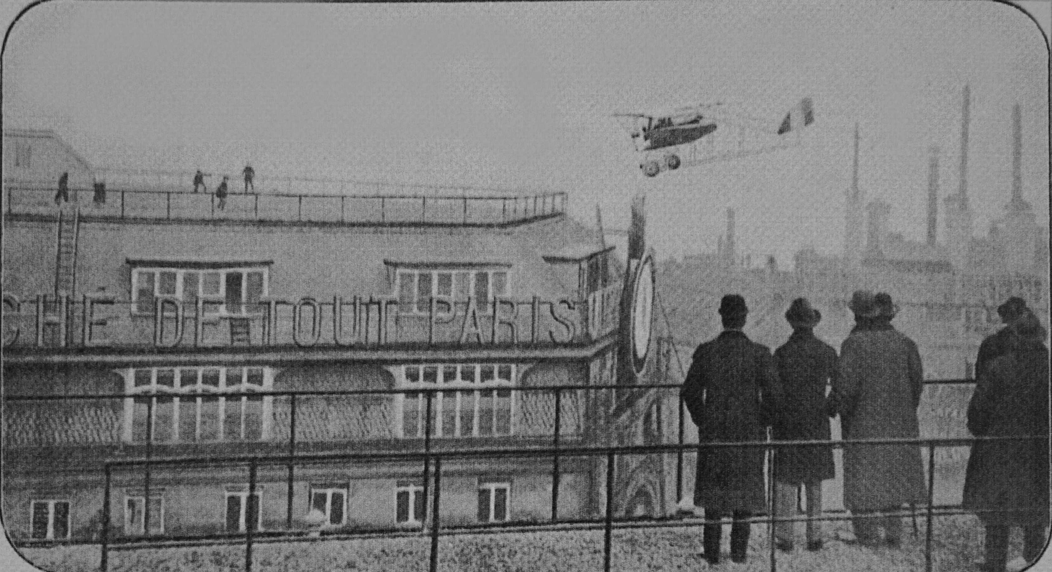 Jules Védrines atterrit sur le toit des Galeries Lafayette, avion Caudron G3 1919